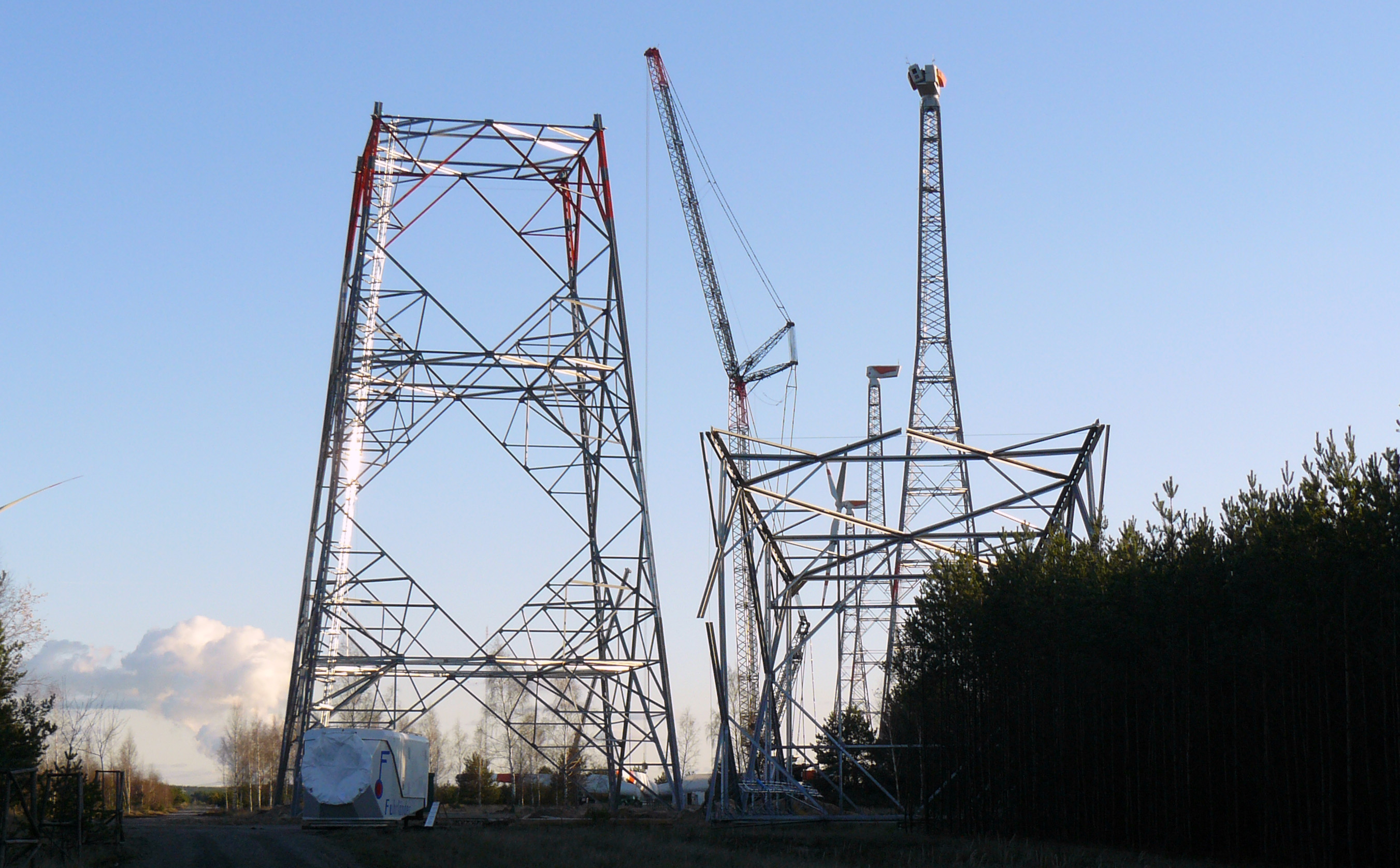 Windpark Spremberg am 17.11.2008